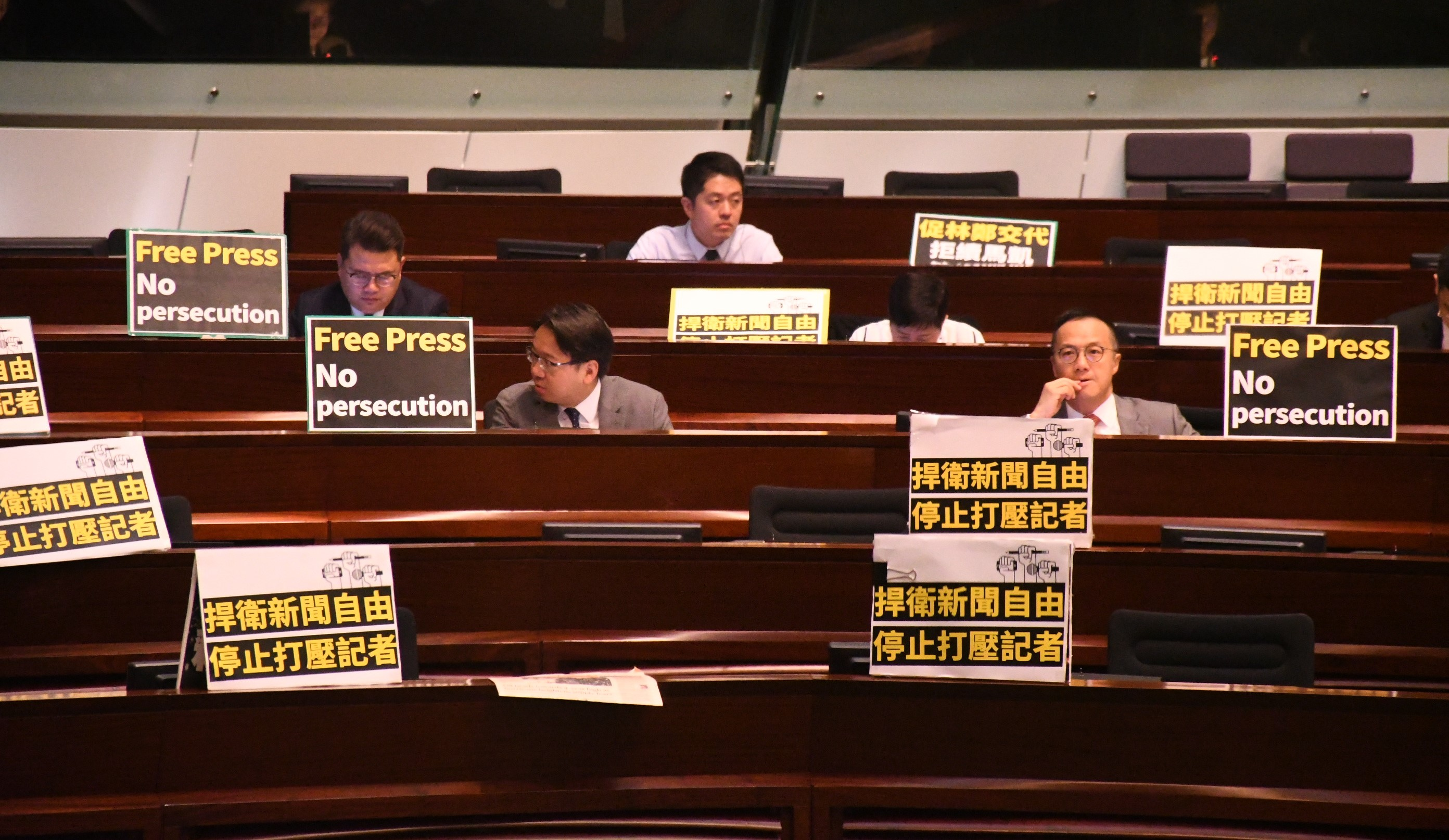 多名民主派議員在座位前放置抗議標語。(美國之音特約記者 湯惠芸拍攝 )